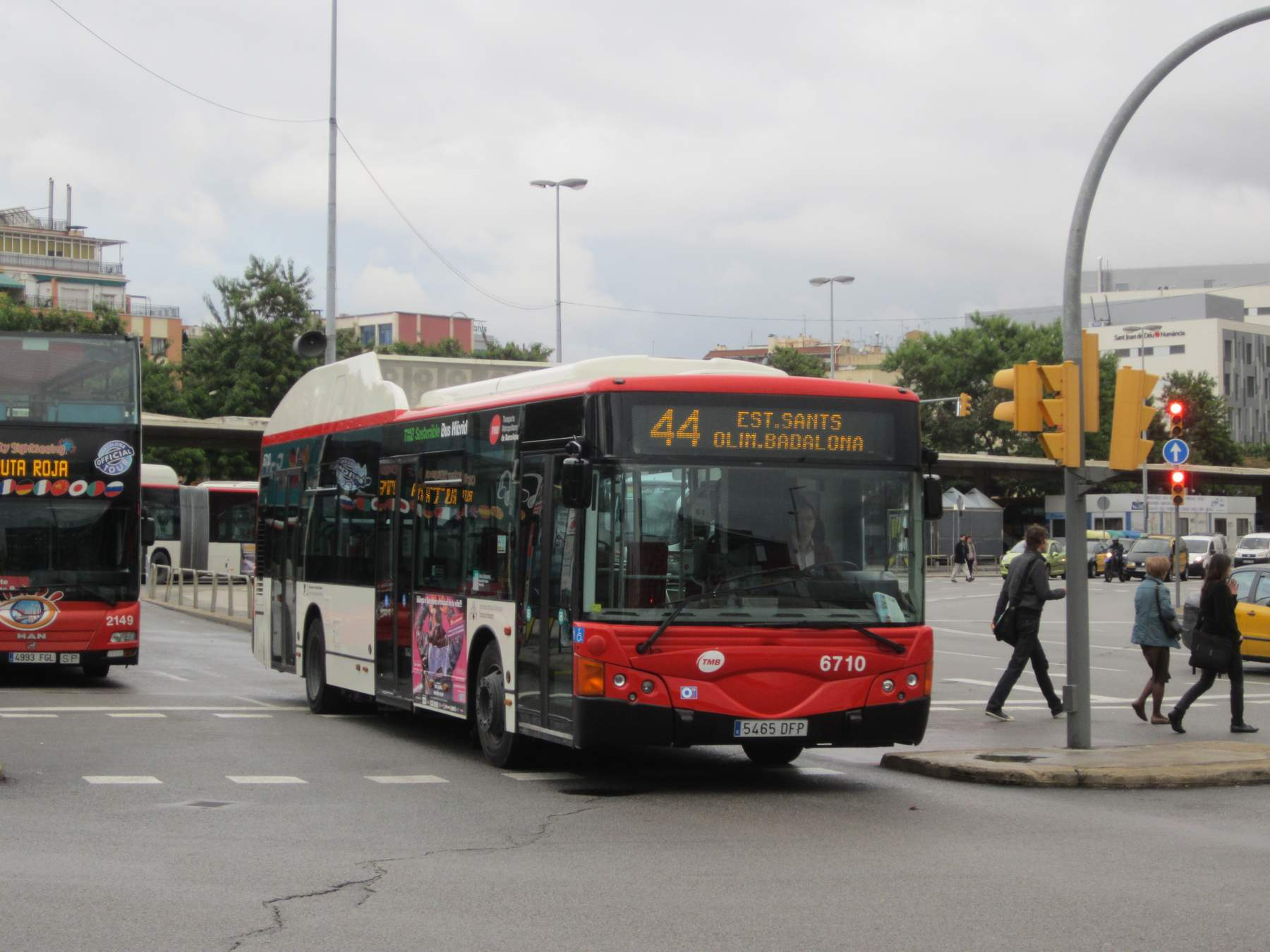 Noge Cittour, TMB, Barcelone